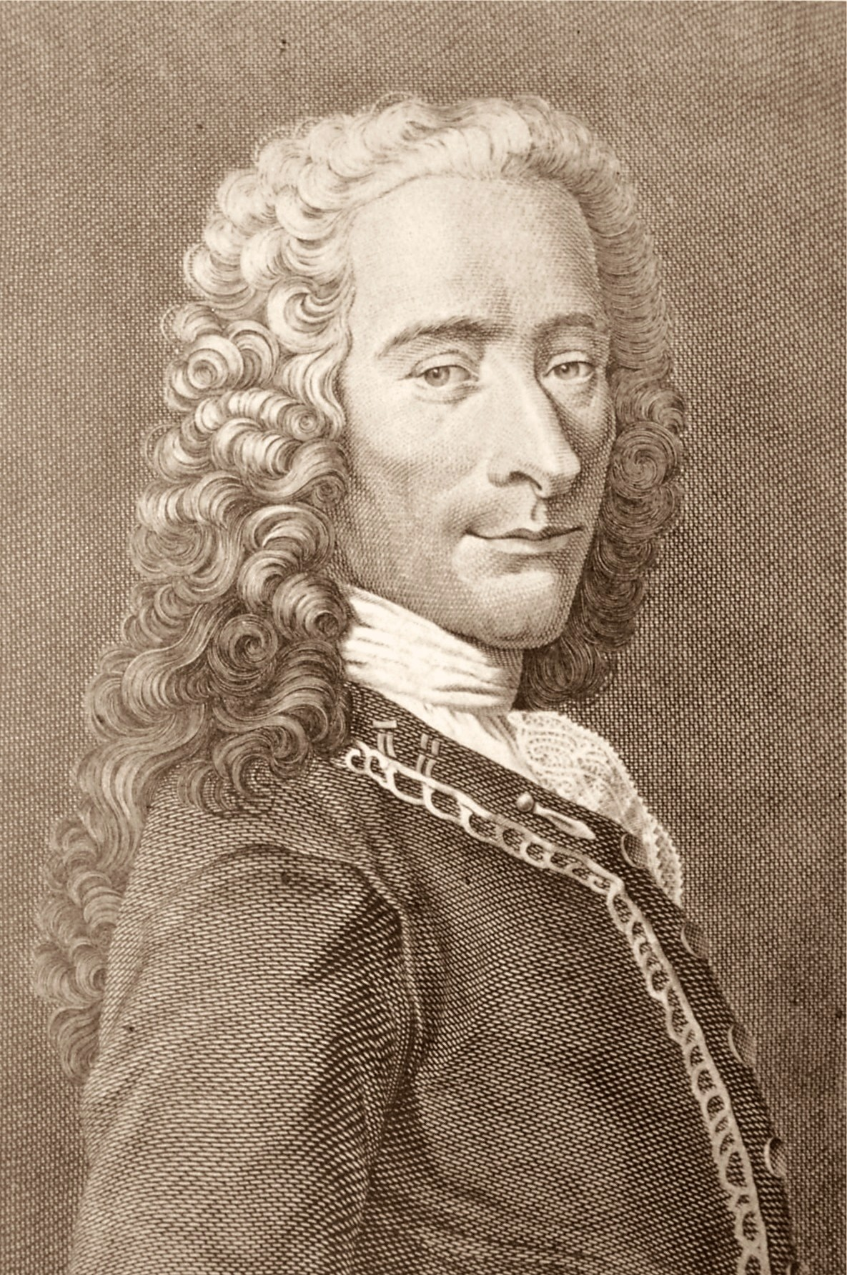 Voltaire - eigentlich François-Marie Arouet 1694-1778 war einer der einflussreichsten Autoren der französischen und europäischen Aufklärung.